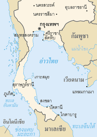 อ่าวไทย แหล่งที่มา เว็บไซต์ของซีไอเอ ดัดแปลงเป็นภาษาไทยโดยผู้อัปโหลด